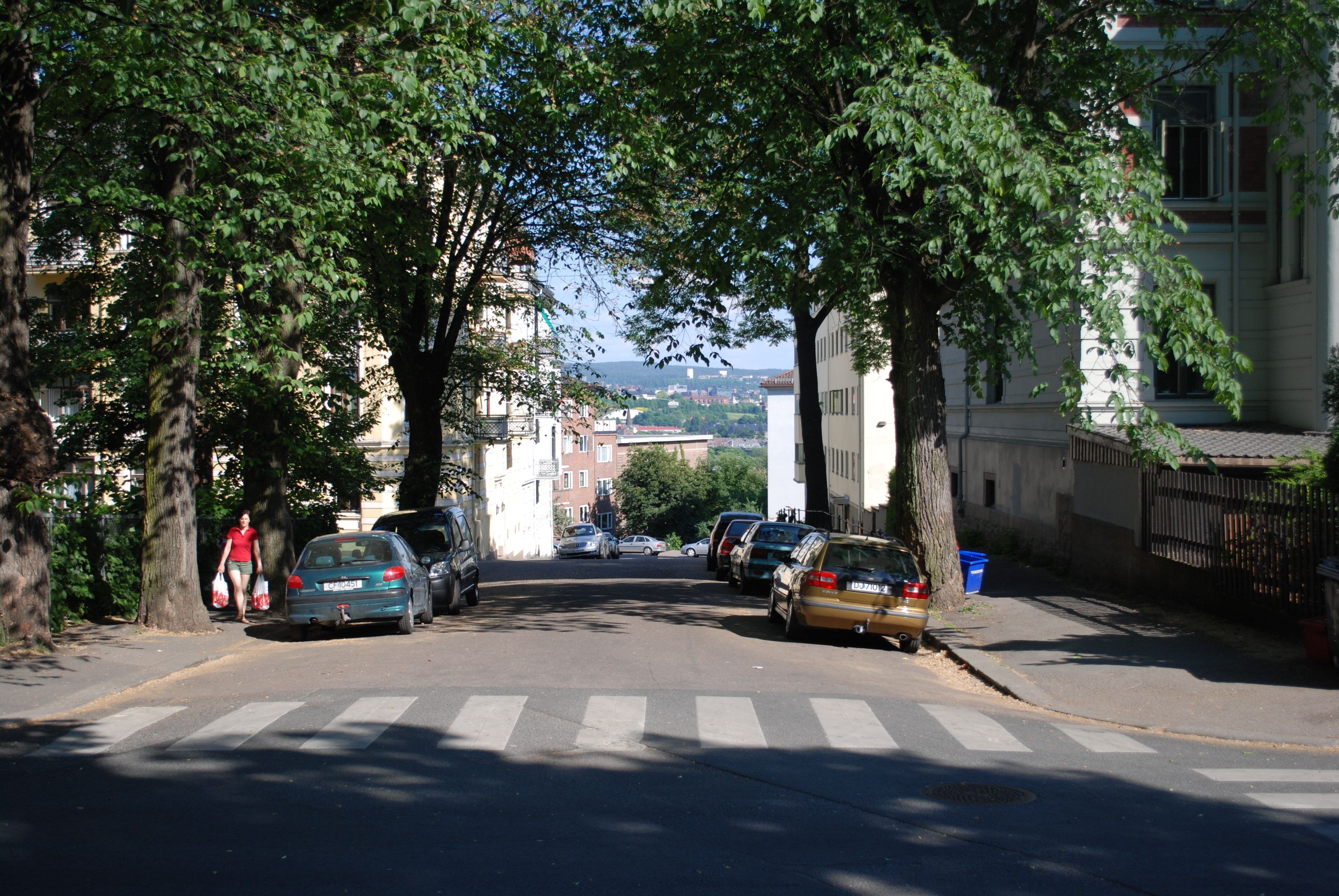 Brandts gate, sett fra Geitmyrsveien, Oslo